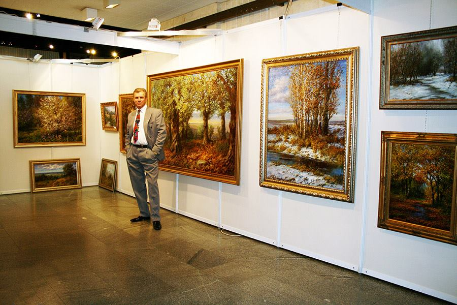 В. Метелкин на выставке в Украинском доме (Киев, март 2010 года)